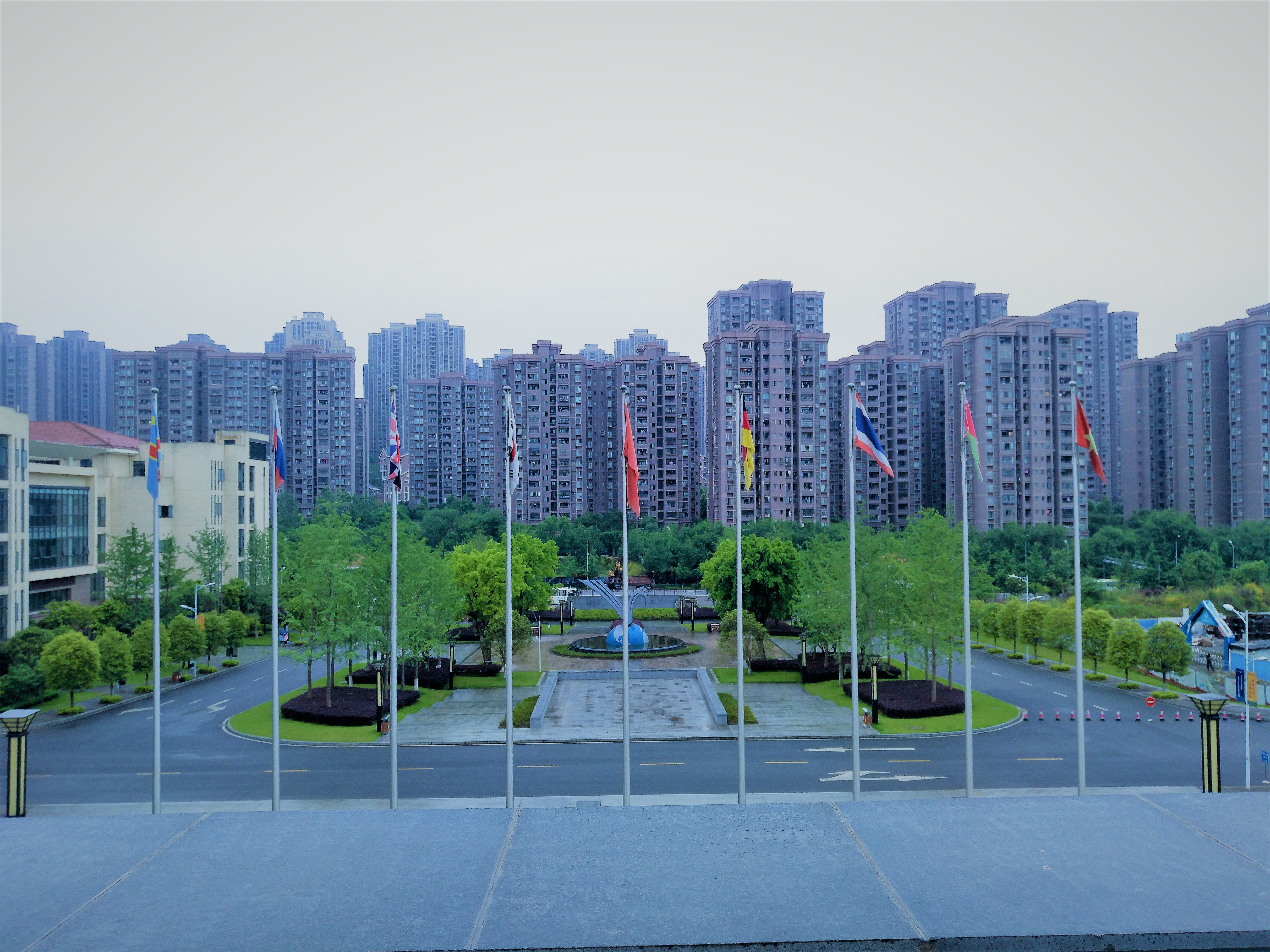 从时钟台眺望重庆理工大学两江校区